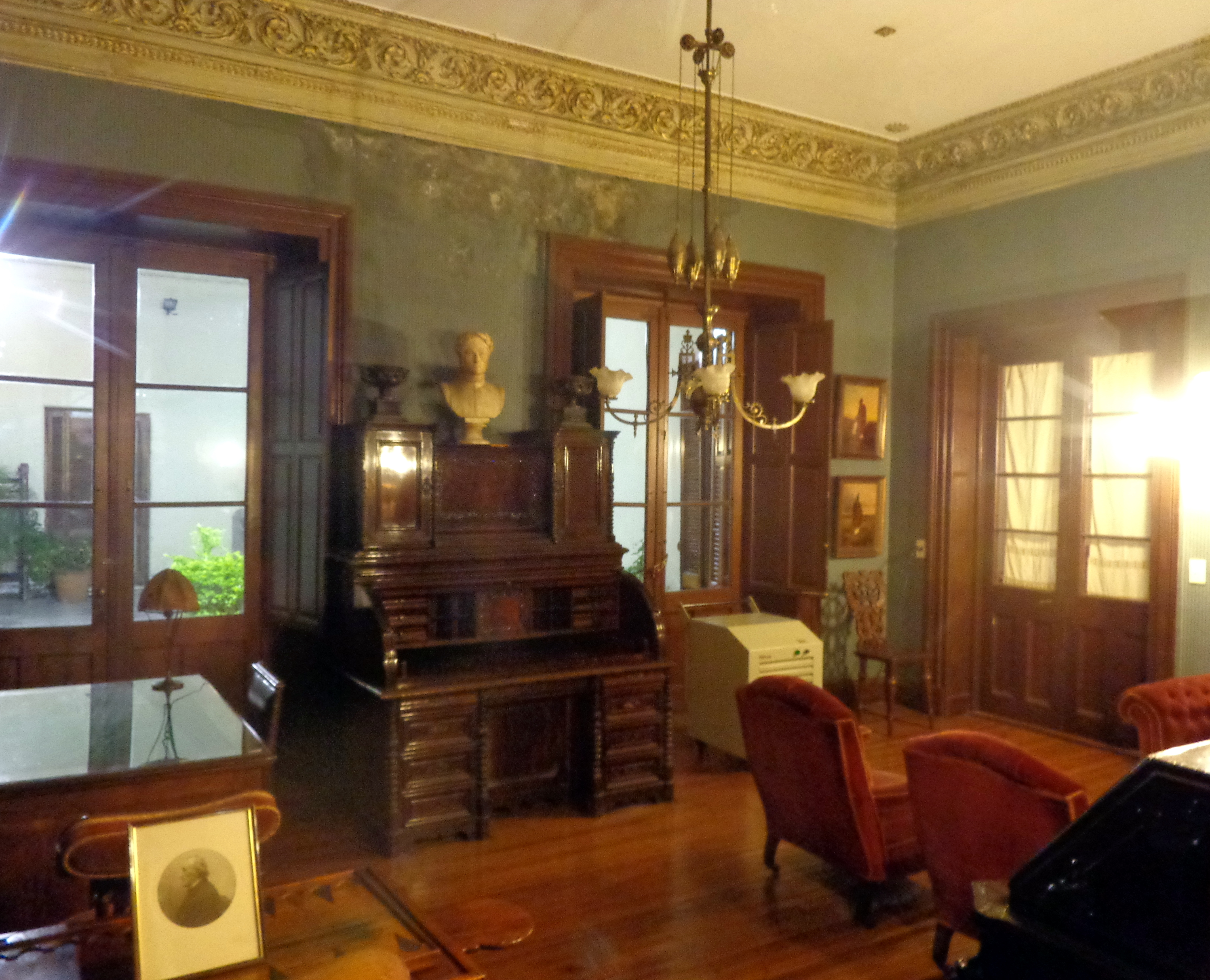 Casa que habitó el General Bartolomé Mitre, actual "Museo Mitre", en Ciudad de Buenos Aires, Argentina.